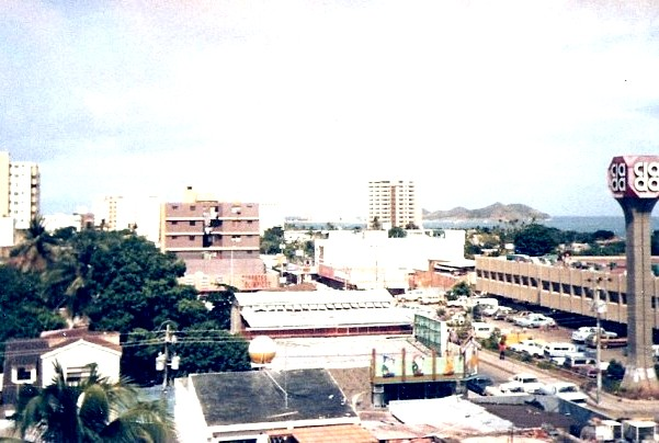 Centro de Polamar (Isla de Margarita), estado Nueva Esparta - Venezuela (1982)